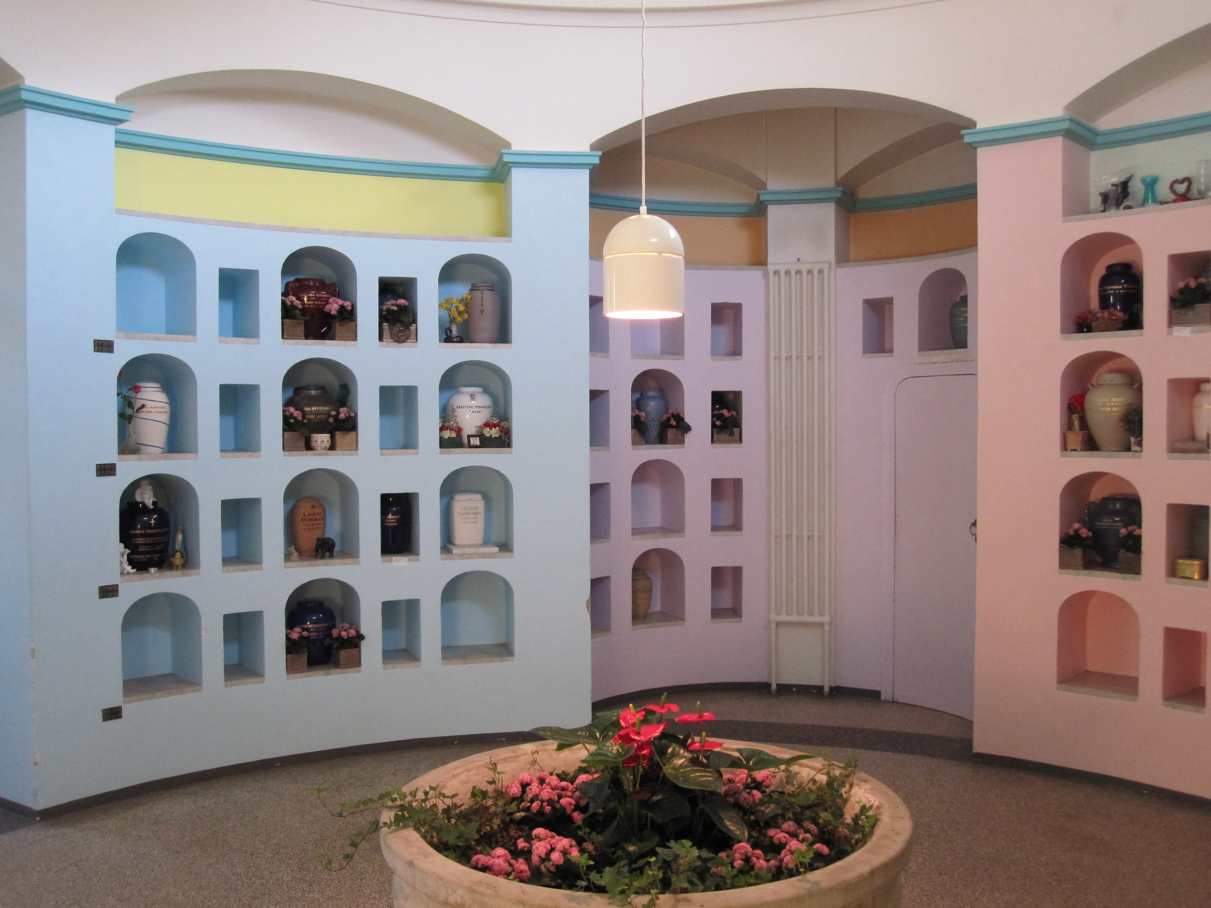 Roundel, Kolumbarium, Bispebjerg Kirkegård.